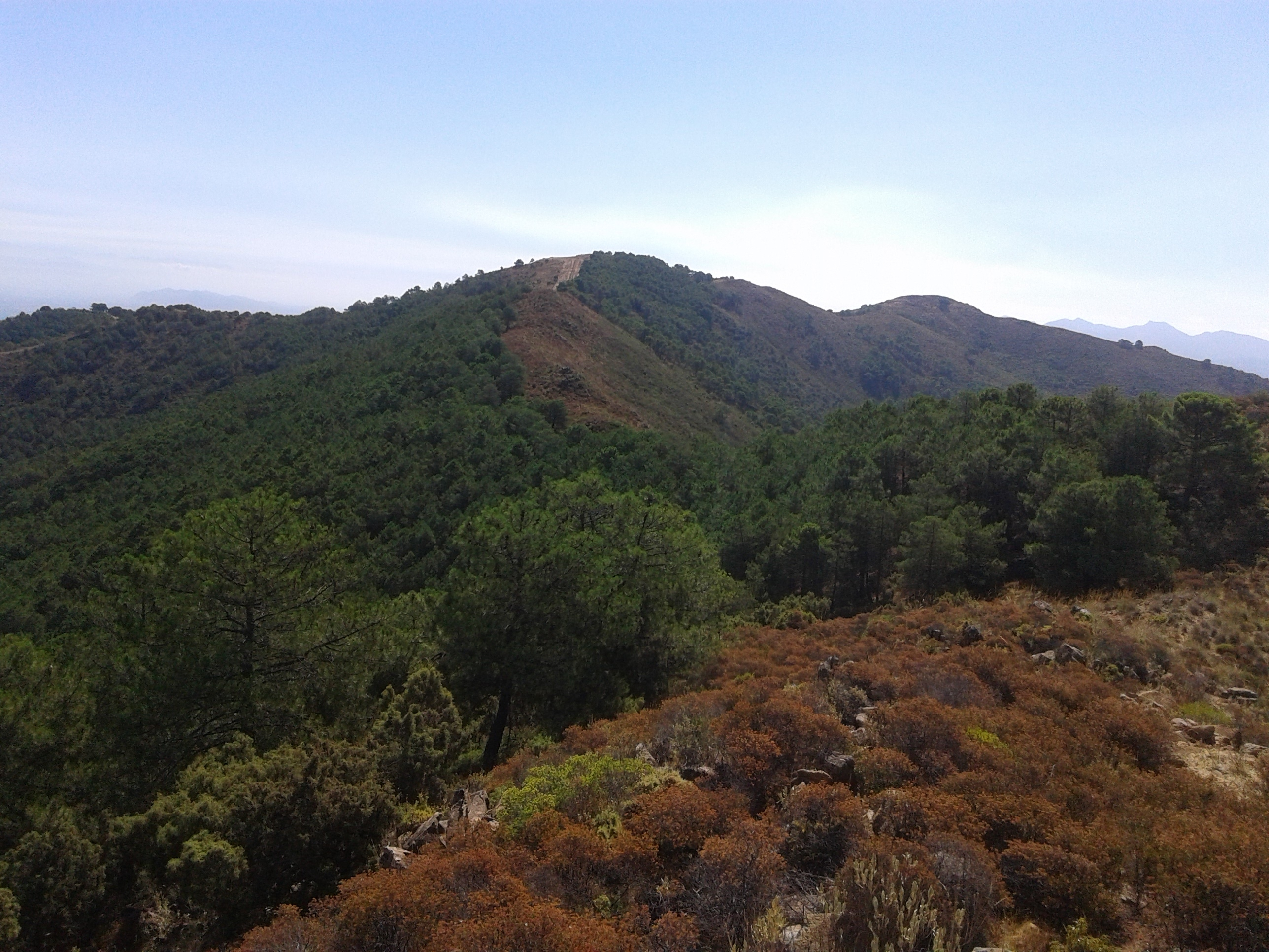 Cima del Pico Aranda desde el final del cortafuegos junto a la torre contraincendios